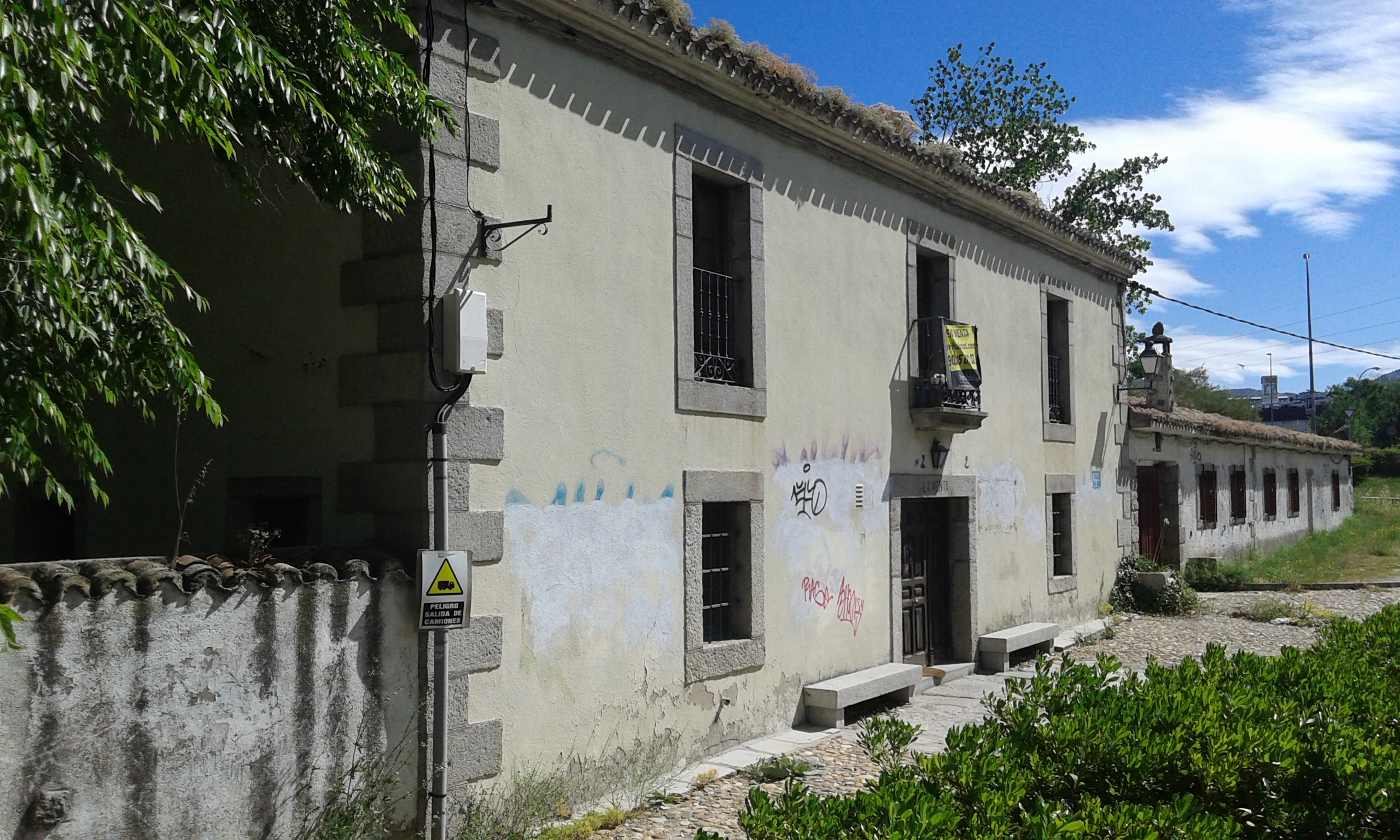 Posada del s. XVI